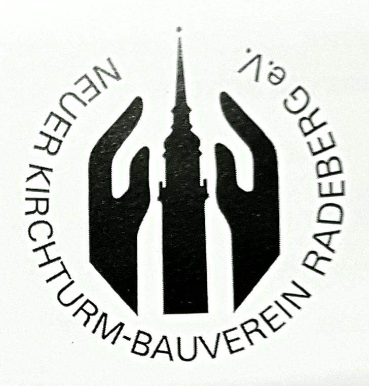 Stadtkirche Radeberg Neuer Kirchturm-Bauverein Radeberg e.V. Logo